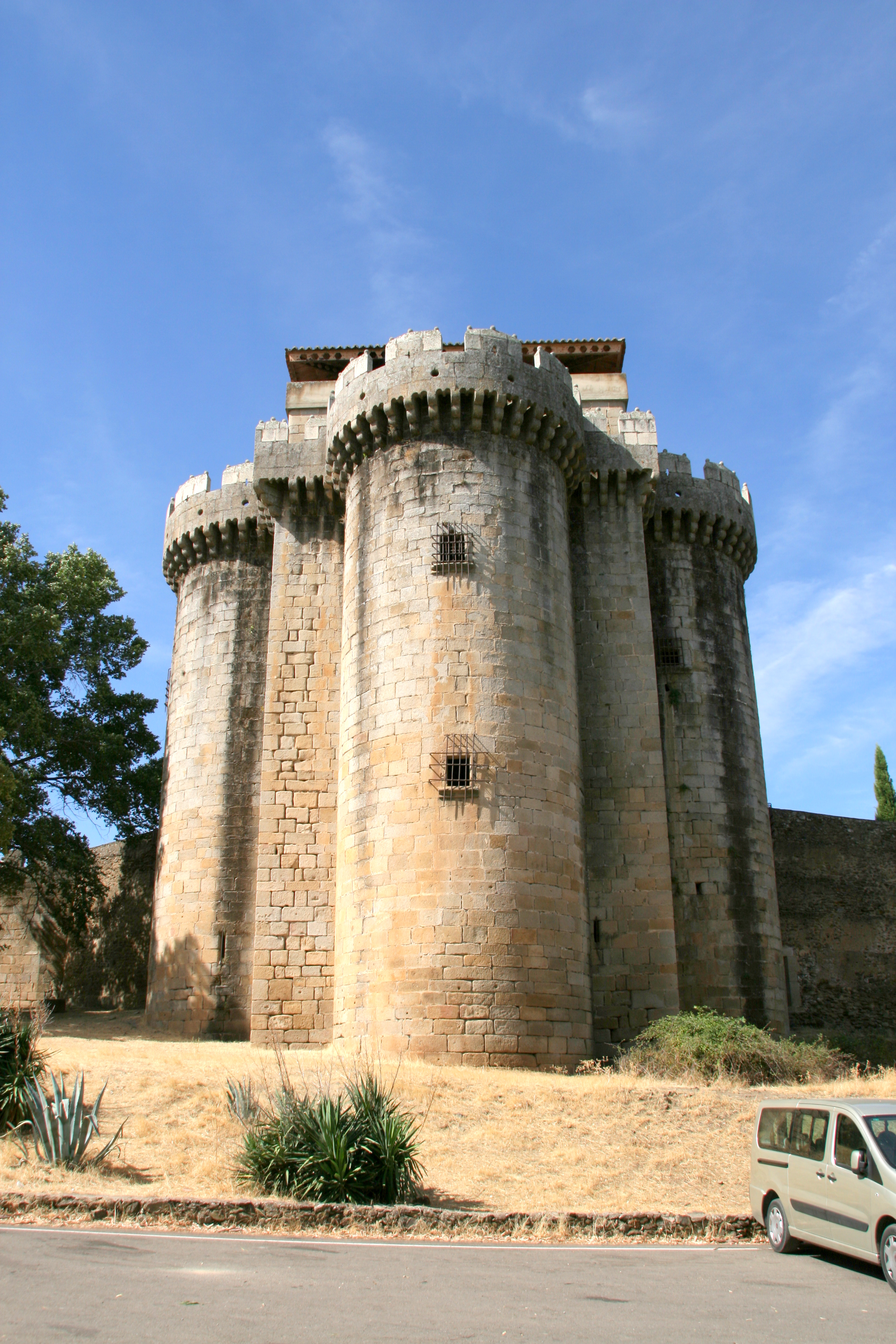 Castillo de Granadilla (Cáceres)